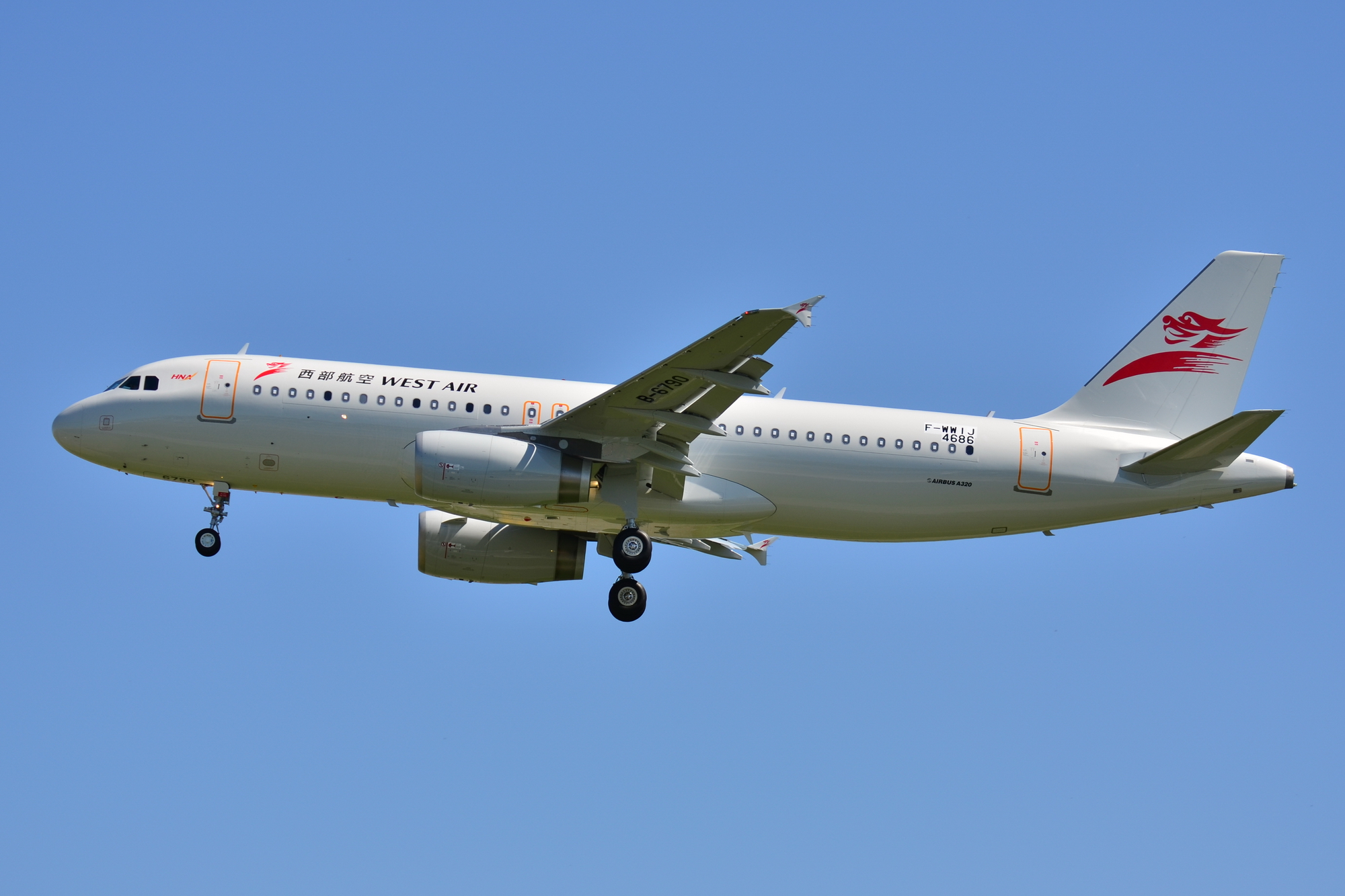 Photo prise à l'aéroport de Toulouse-Blagnac (LFBO) en France. Picture take at Toulouse-Blagnac Airport (LFBO) in France.